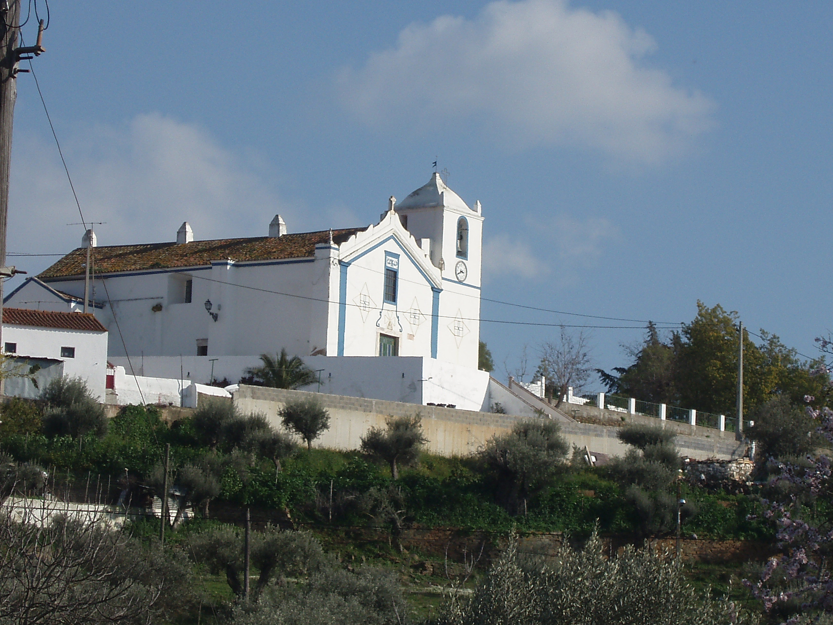 Igreja Matriz de Terena, Portugal